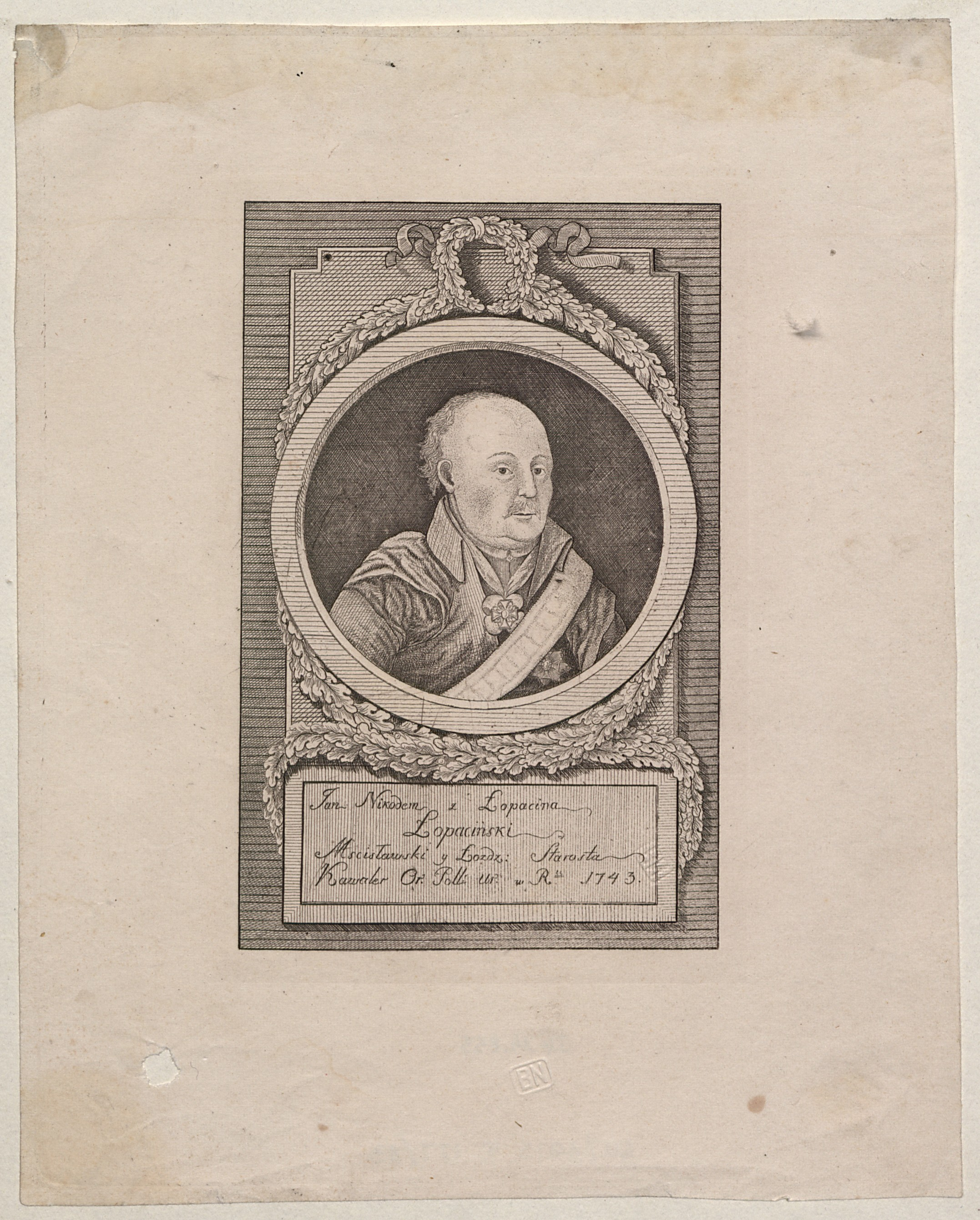 Беларуская (тарашкевіца): Аўтапартрэт Яна Нікадзіма Лапацінскага (Jan Nikadzim Łapacinski)